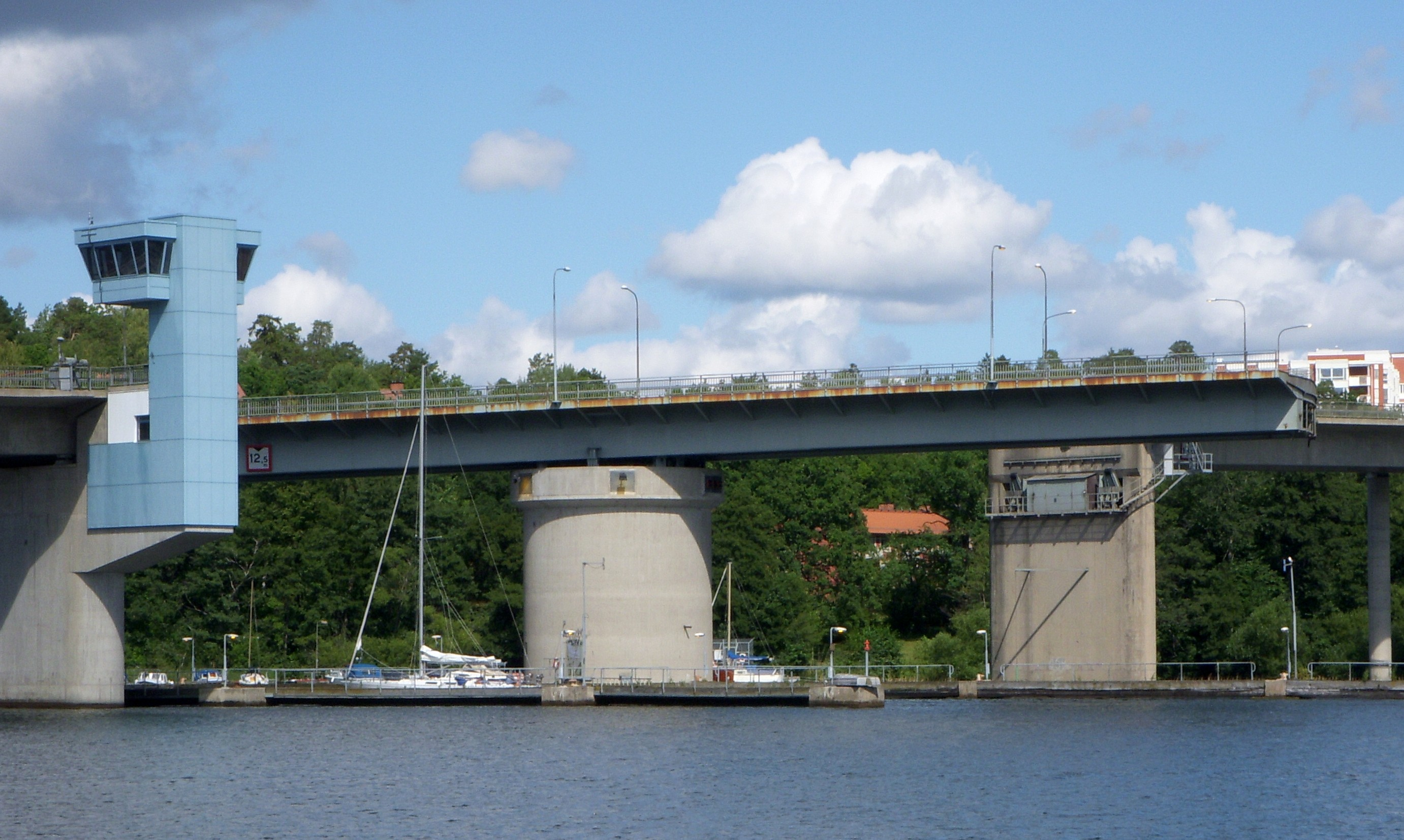 Nockebybron mellan Ekerö och Stockholm öppnas och en segelbåt passerar.